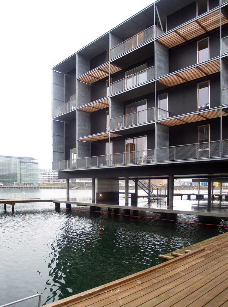 Teglværkshavnen housing, Copenhagen Denmark, 2003-2008. Architects: Tegnestuen Vandkunsten.